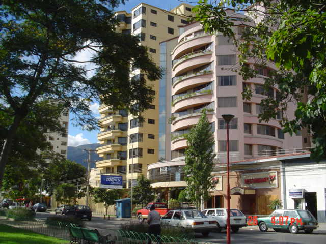 La Av. Ballivian, también conocida como el Prado.